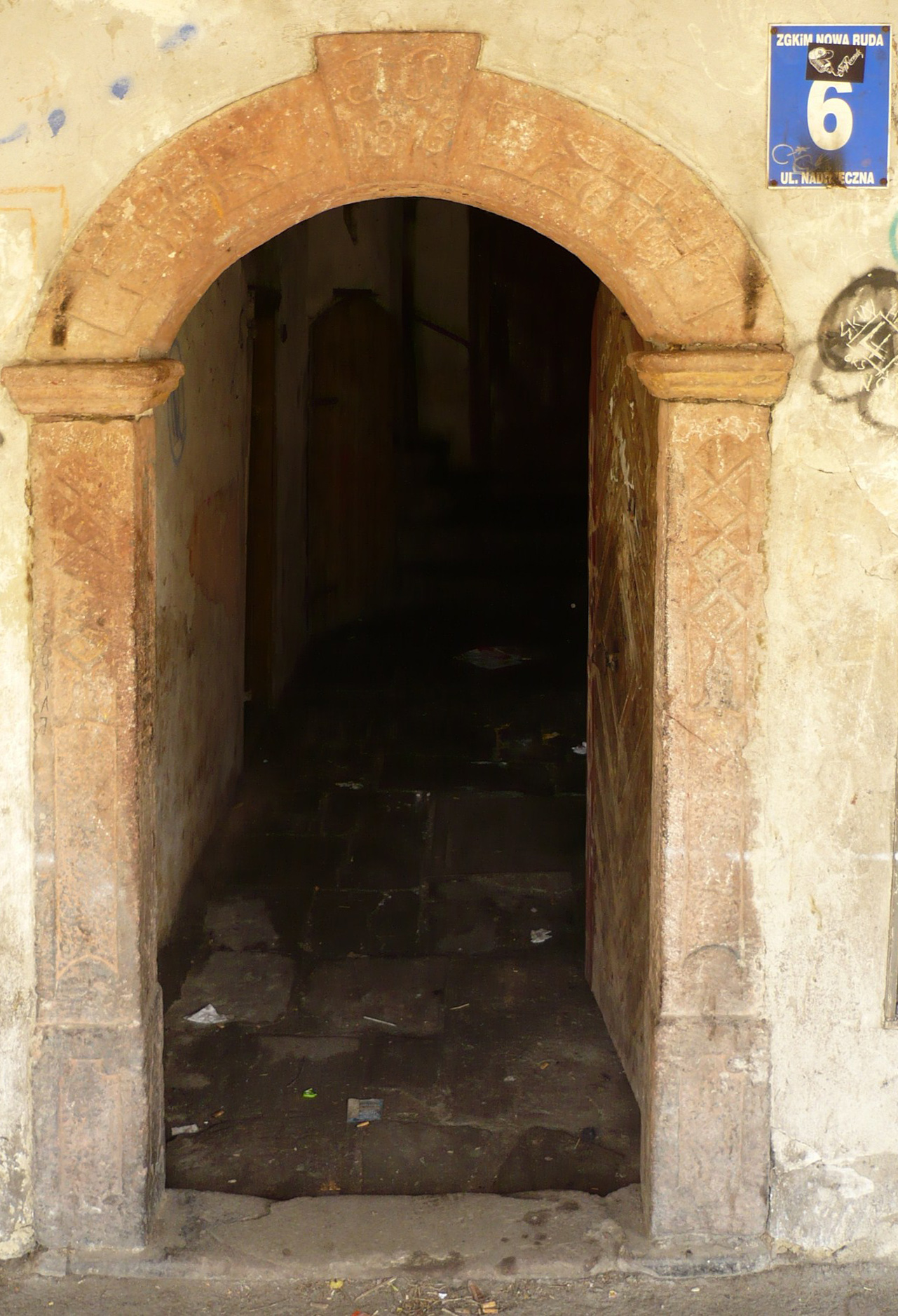 Nowa Ruda ul. Nadrzeczna 6, brama